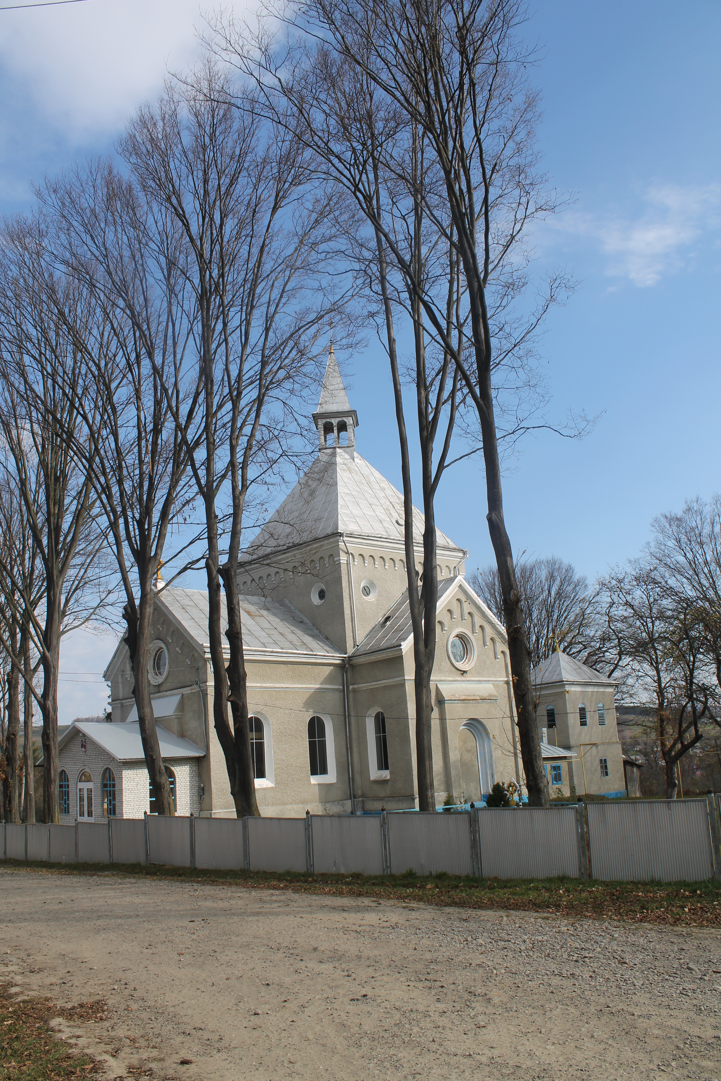 Церква (Воздвиження Чесного Хреста) (мур.), с. Бобівці